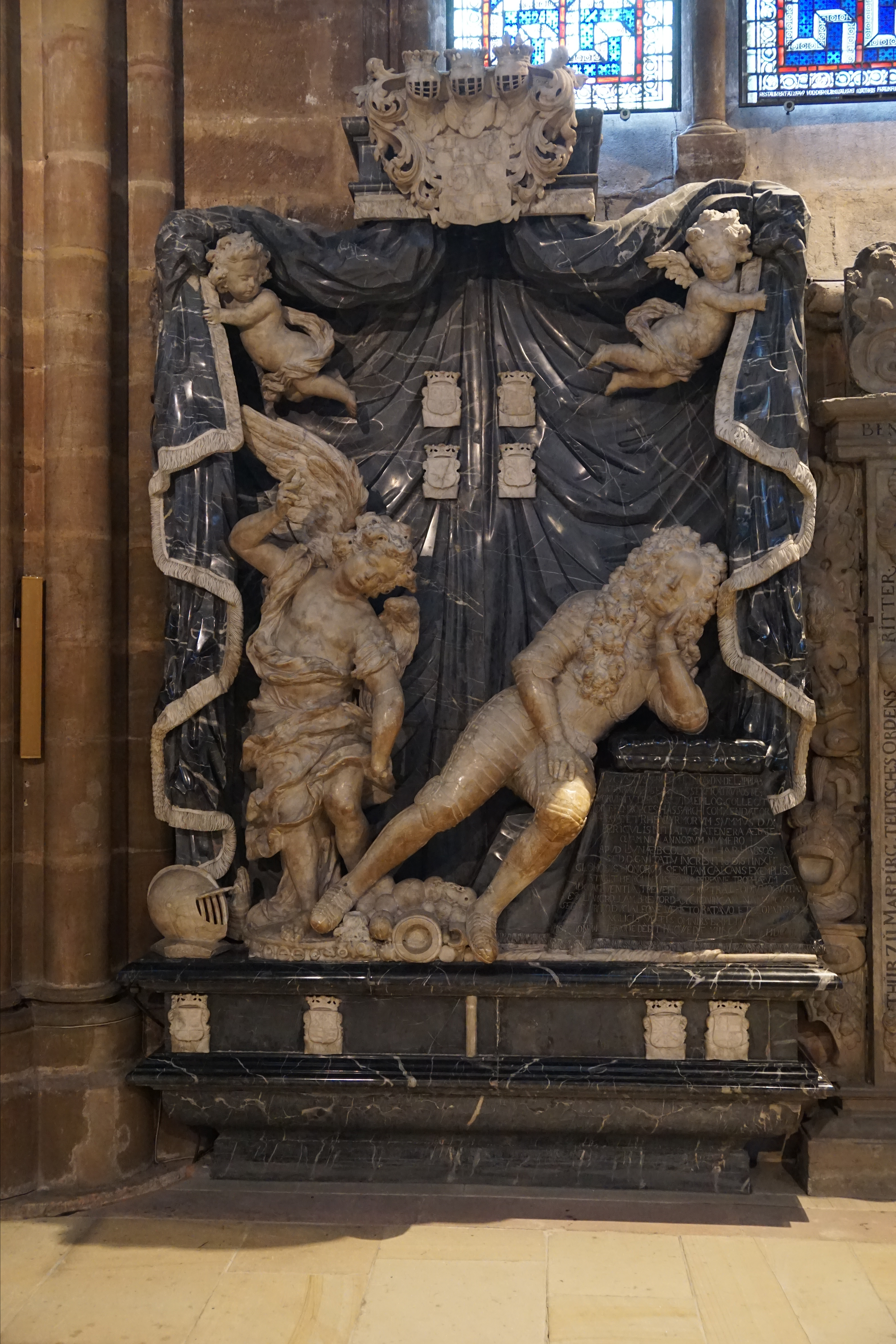 Siehe Dateiname